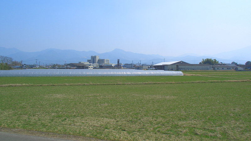 くま川鉄道湯前線ja:公立病院前駅 駅周辺 ホーム上から南東側を見る。 中央のビルがja:球磨郡公立多良木病院、その手前をja:国道219号が走る。 撮影者/著者/著作権保有者 : MK Products (本人がアップロード) 撮影日 : 2007/03/22 公立病院前駅用にアップロードした画像です。良い画像があれば別の画像に変えてください。